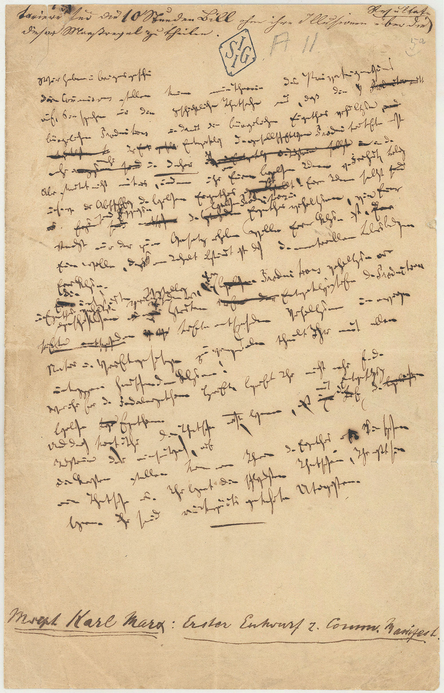 Manuskriptseite kommunistisches manifest, Public Domain Fast unleserliche einzig erhaltene Manuskriptseite des kommunitischen Manifests von Karl Marx.